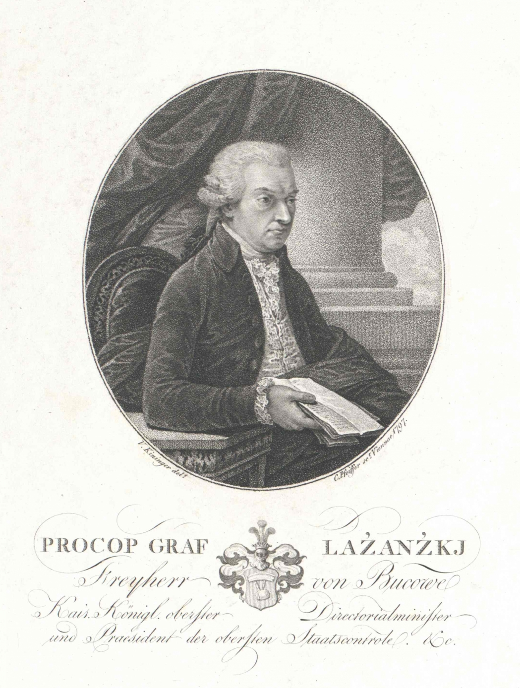 Prokop Lažanský z Bukové (1741–1804)